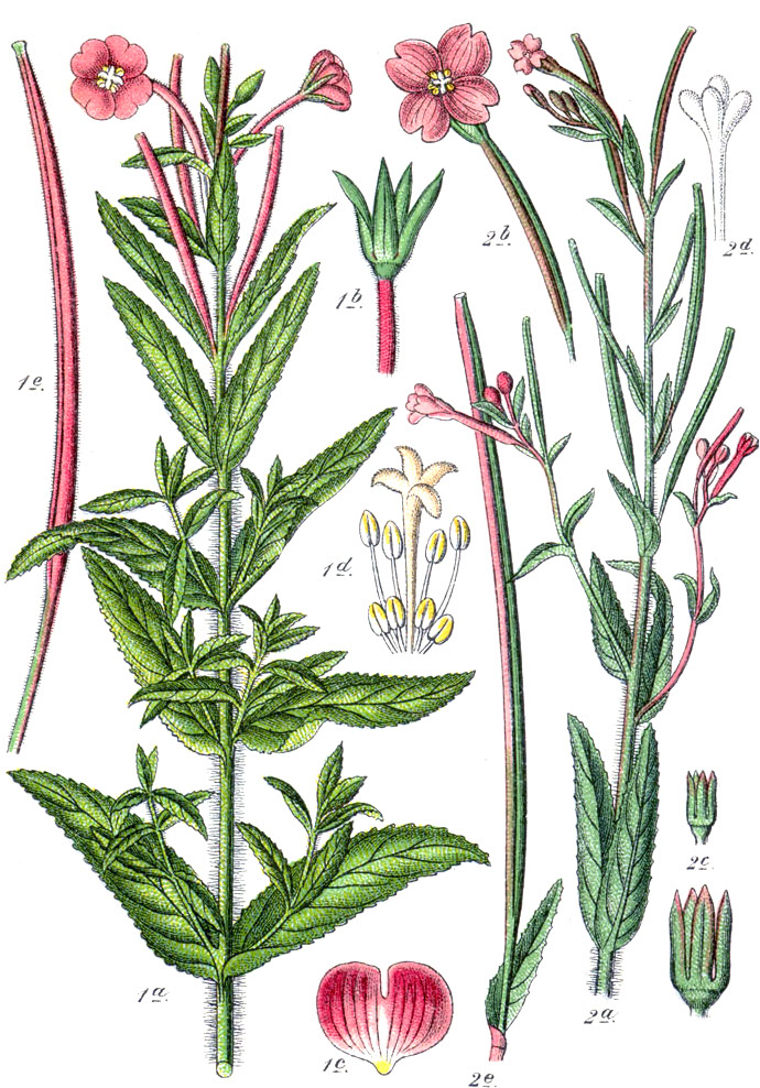 1. Epilobium hirsutum L., syn. Epilobium grandiflorum Weber 2. Epilobium parviflorum Schreb. Original Caption 1. Grossblumiges Weidenröschen, Epilobium grandiflorum 2. Kleinblumiges Weidenröschen, E. parviflorum